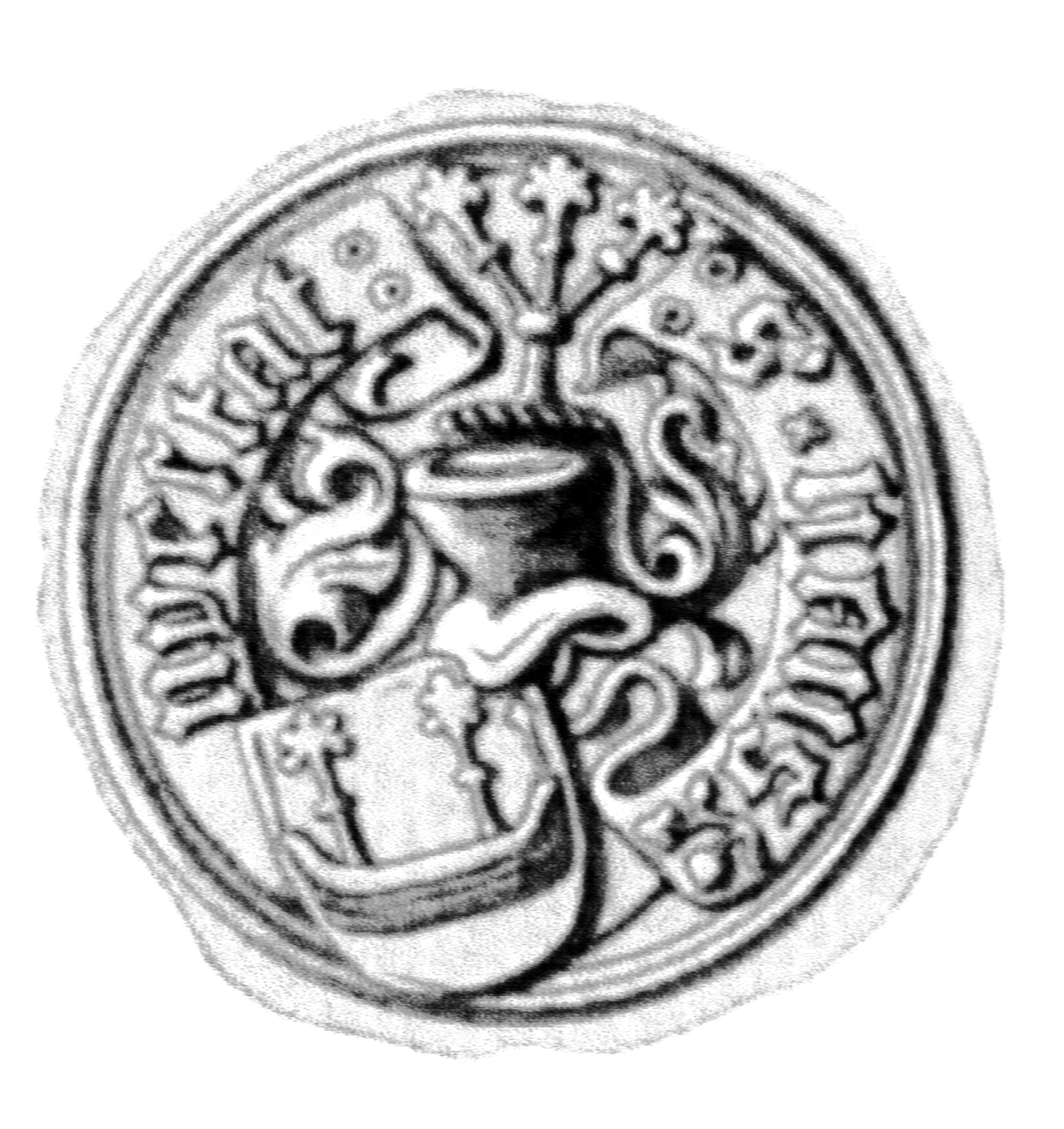 Siegel des Ratsmannes Johann Neystad. Das Siegel stammt aus der Zeit um 1516. Siehe Emil Ferdinand Fehling: Lübeckische Ratslinie, Nr. 586 (Johann Nyestadt).